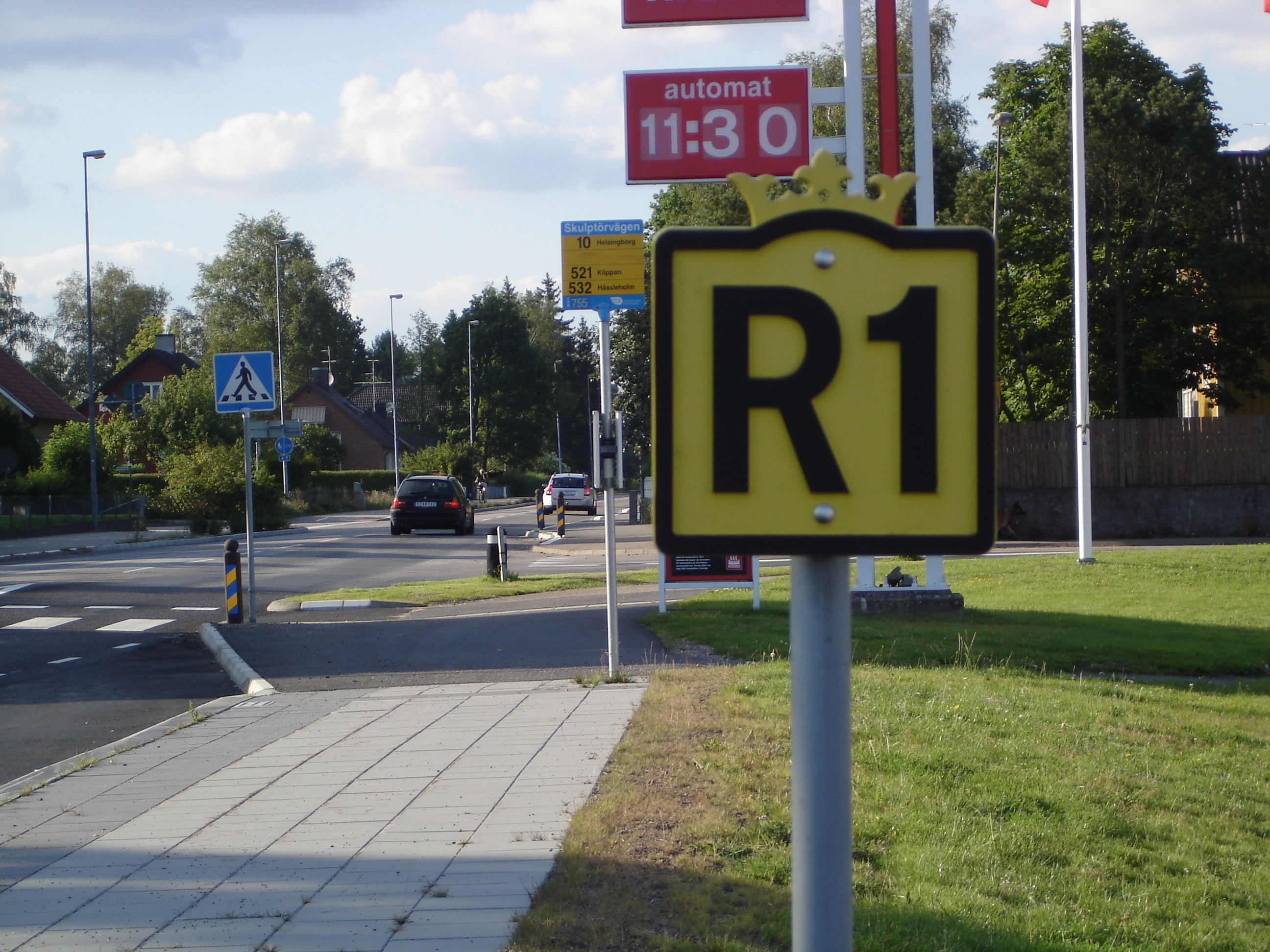 Hinweisschild auf die Riksettan in Markaryd in Schweden